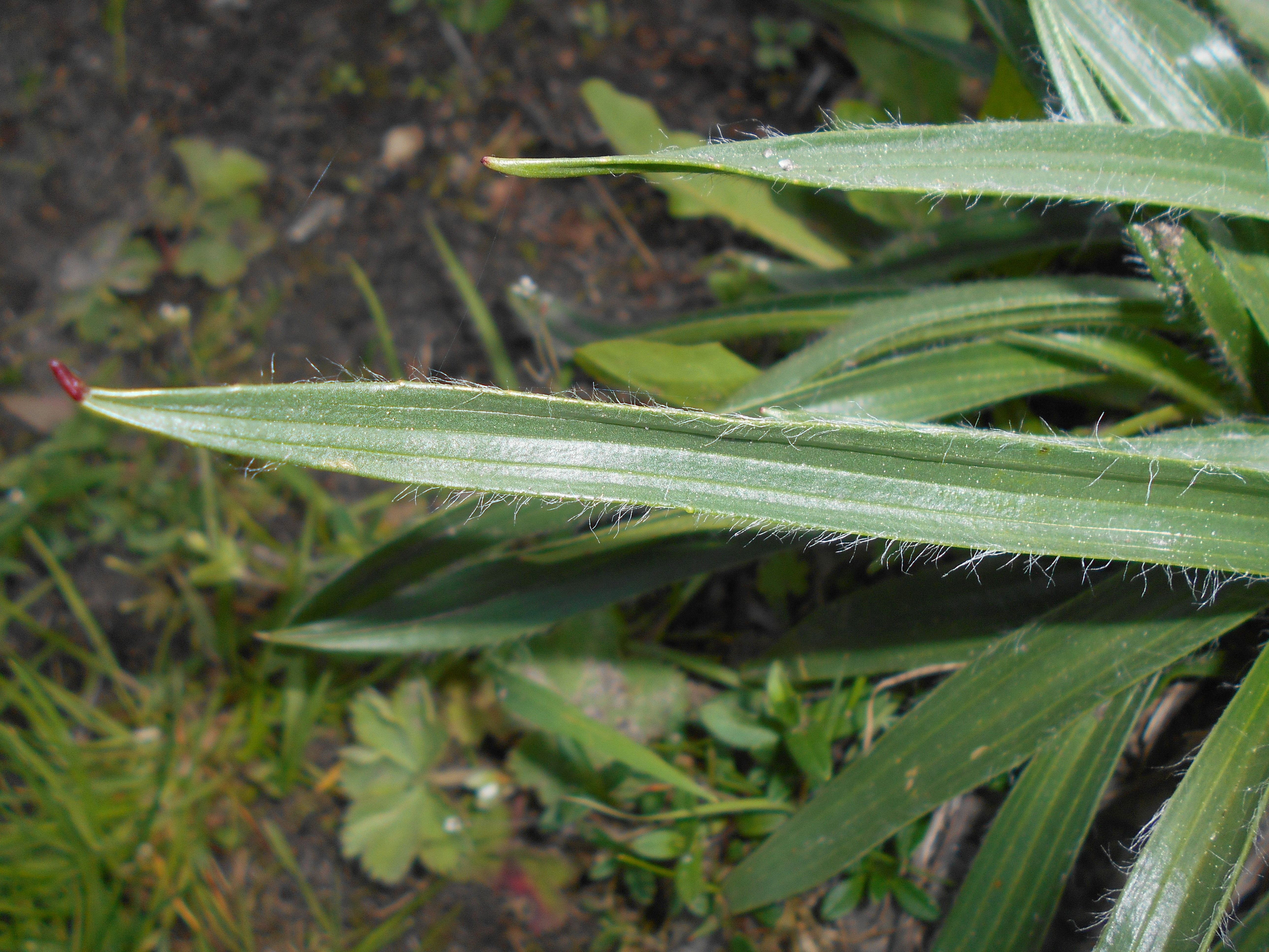 Babka górska (Plantago atrata), Ogród Botaniczny PAN w Warszawie.